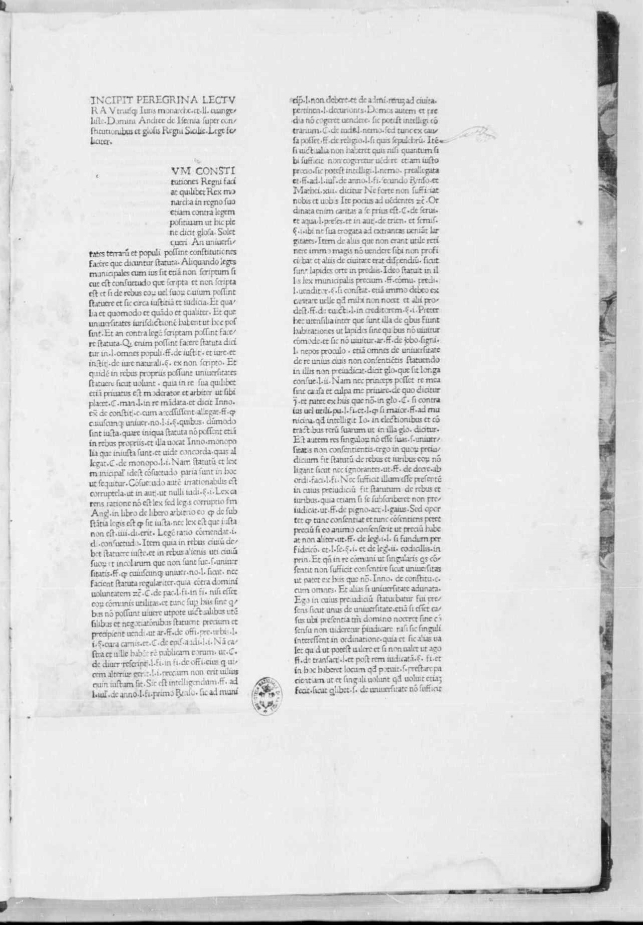 carta a2r